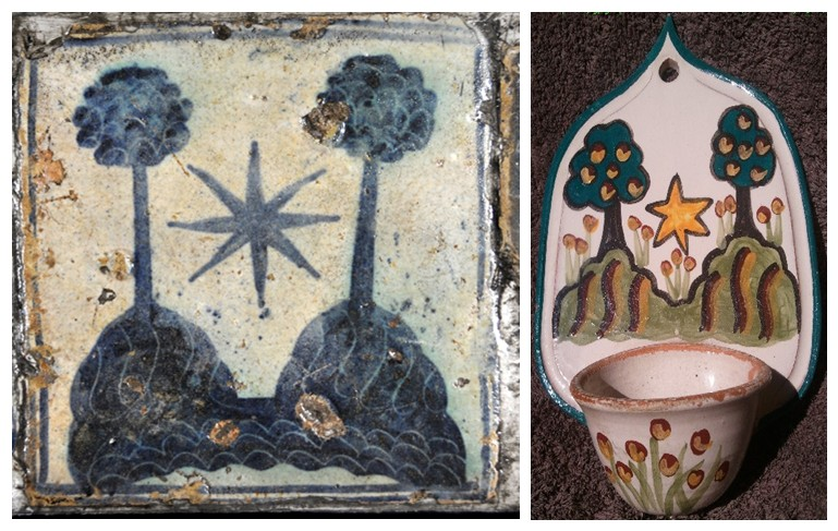 A la izquierda, azulejo renacentista de loza de Manises (Valencia), de la Colección Alberto Folch-Rusiñol, conservado en la Fundación La Fontana, con la siguiente ficha: Objeto: Azulejo Topónimo: Manises Materiales: Loza pintada Dimensiones: L. 11 cm · Anc. 11 cm Motivo: Azulejo con el escudo de la villa de Riudoms, Tarragona. A la derecha, versión el mismo motivo en una pila benditera comprada en la Galería de artesanos de Sigüenza en 1992. Colección de benditeras tradicionales del Alfar del Monte de Pozancos (Guadalajara, España).